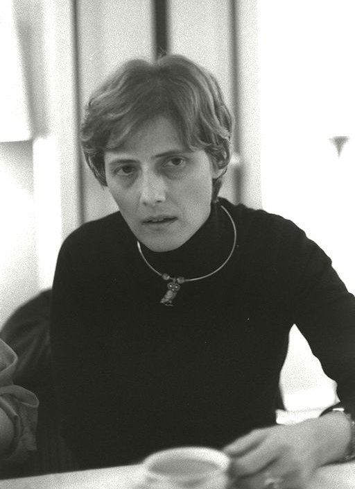 Beschreibung: Petra Kelly 1987 im Bundestag *Quelle: selbst fotografiert